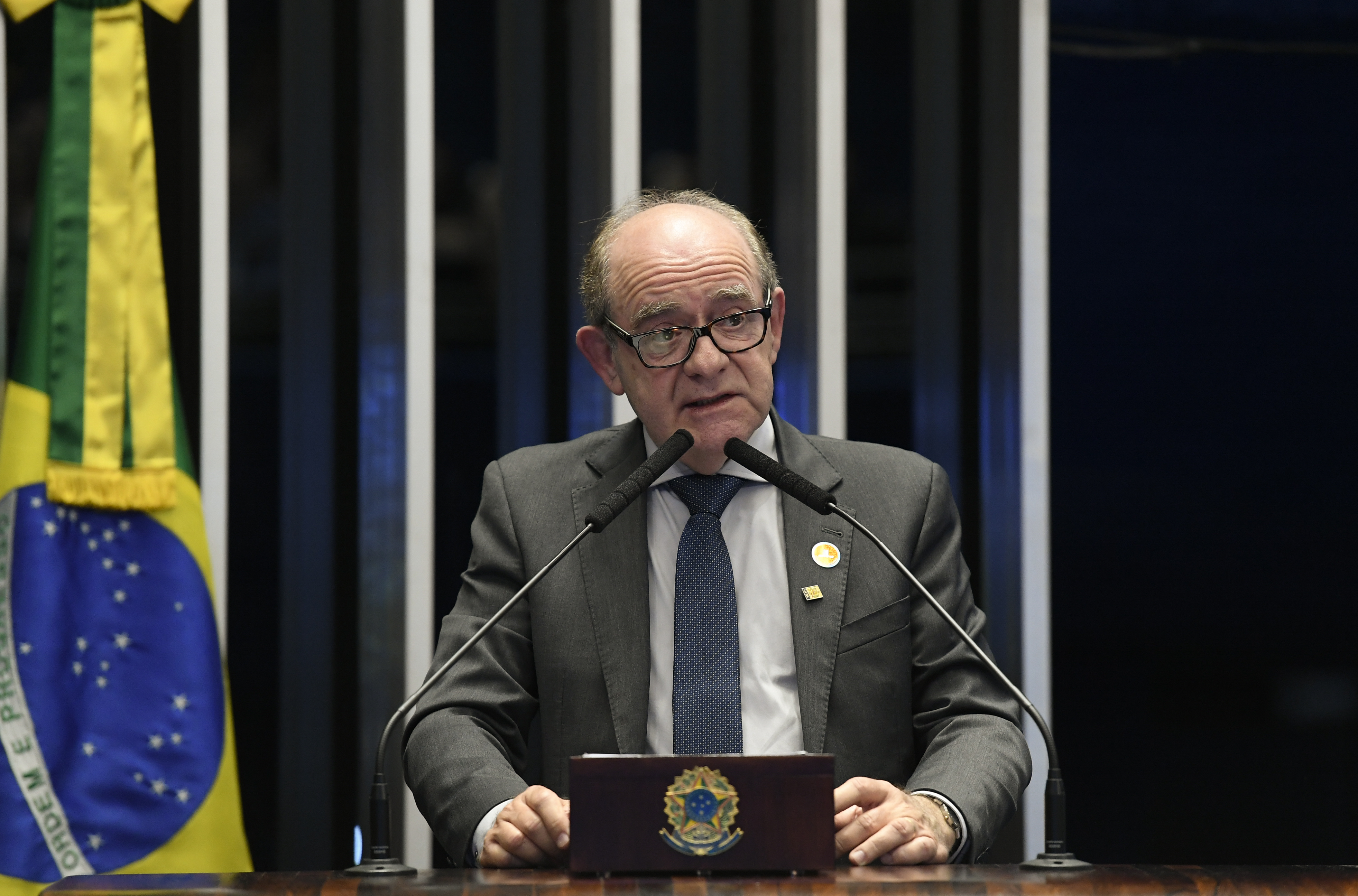 O reitor da Universidade Federal de Santa Catarina (UFSC), Ubaldo Cesar Balthazar, discursando na tribuna do Senado Federal durante sessão especial destinada a comemorar os 40 anos de gestão da Universidade Federal de Santa Catarina (UFSC) nas Fortalezas de defesa da Ilha de Santa Catarina. Foto: Roque de Sá/Agência Senado